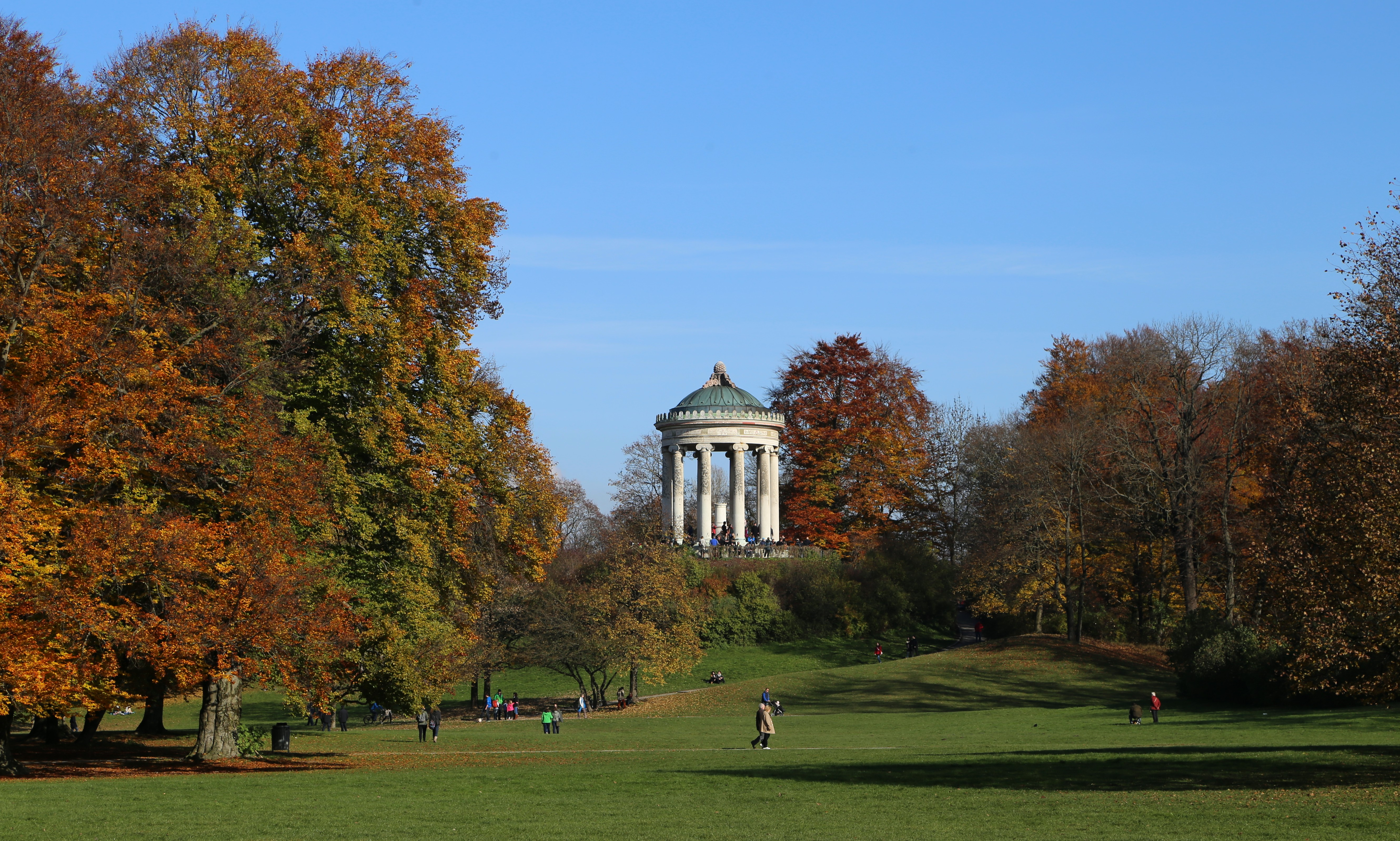 Monopteros im Englischen Garten, München